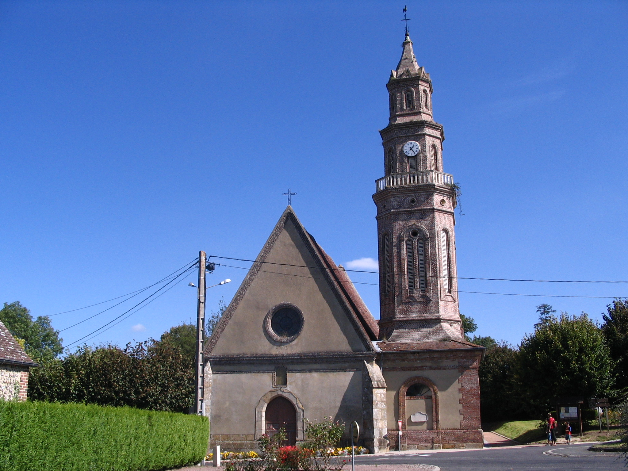 Eglise de Chandaie (Orne,France)